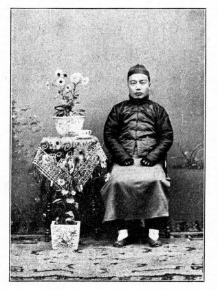 中文（台灣）: 王文芹議員